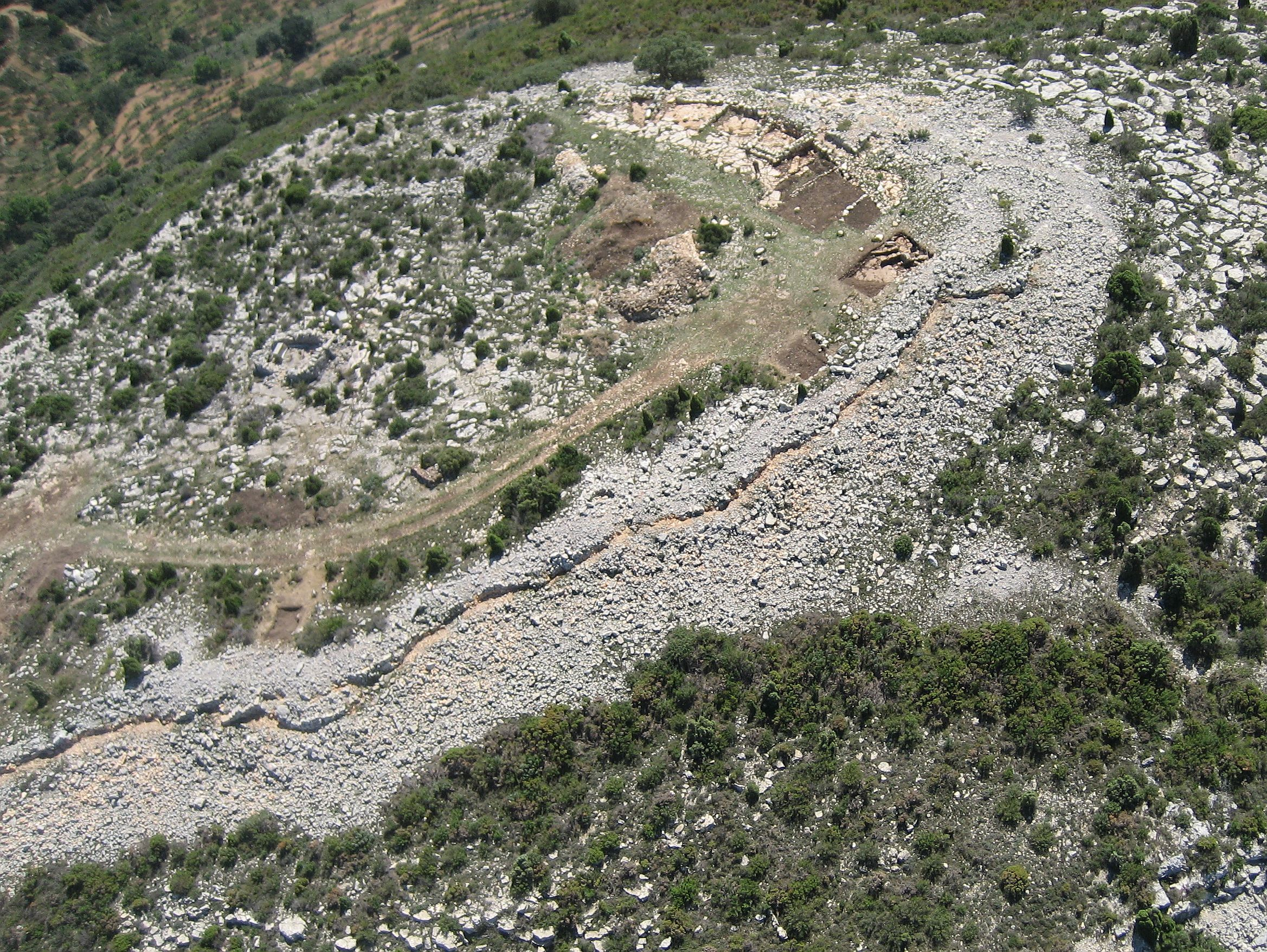 Vista aérea del Tossal de la Vila